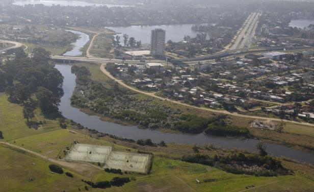 Arroyo Carrasco